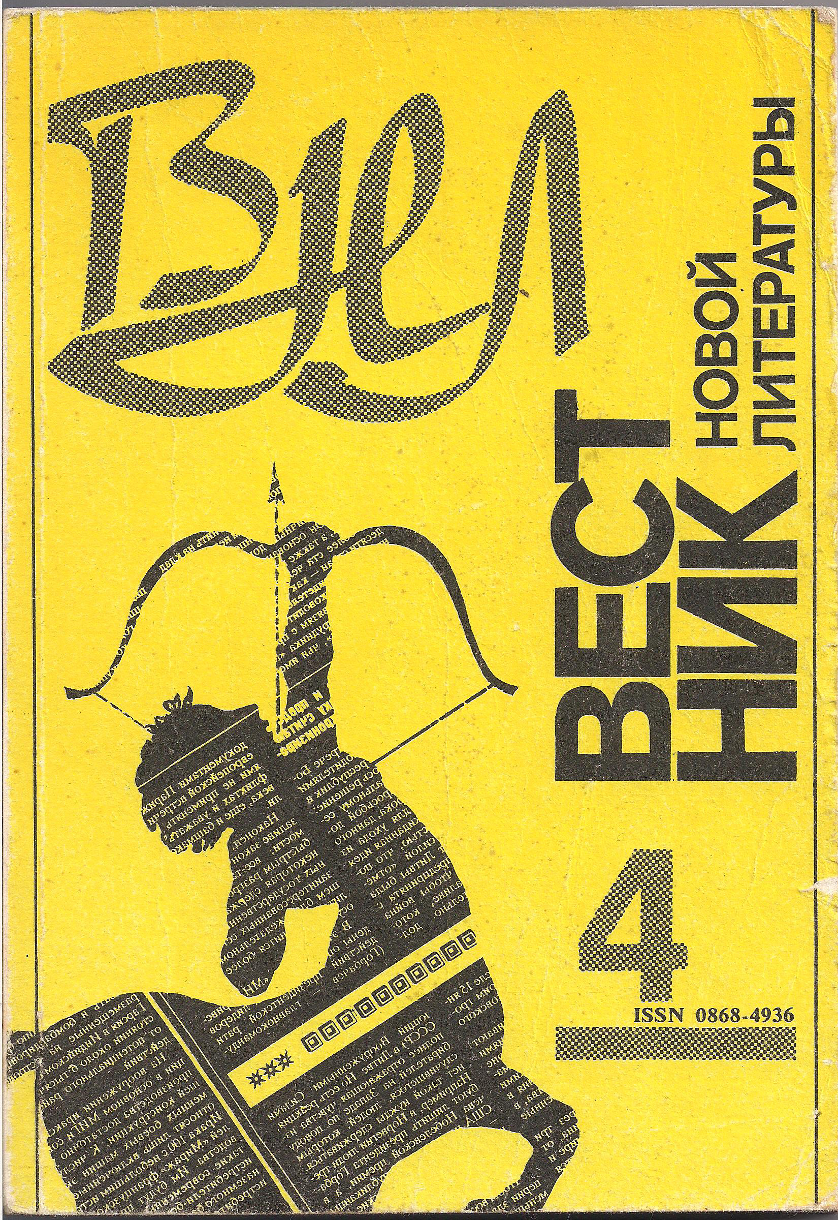 Обложка ВНЛ №4